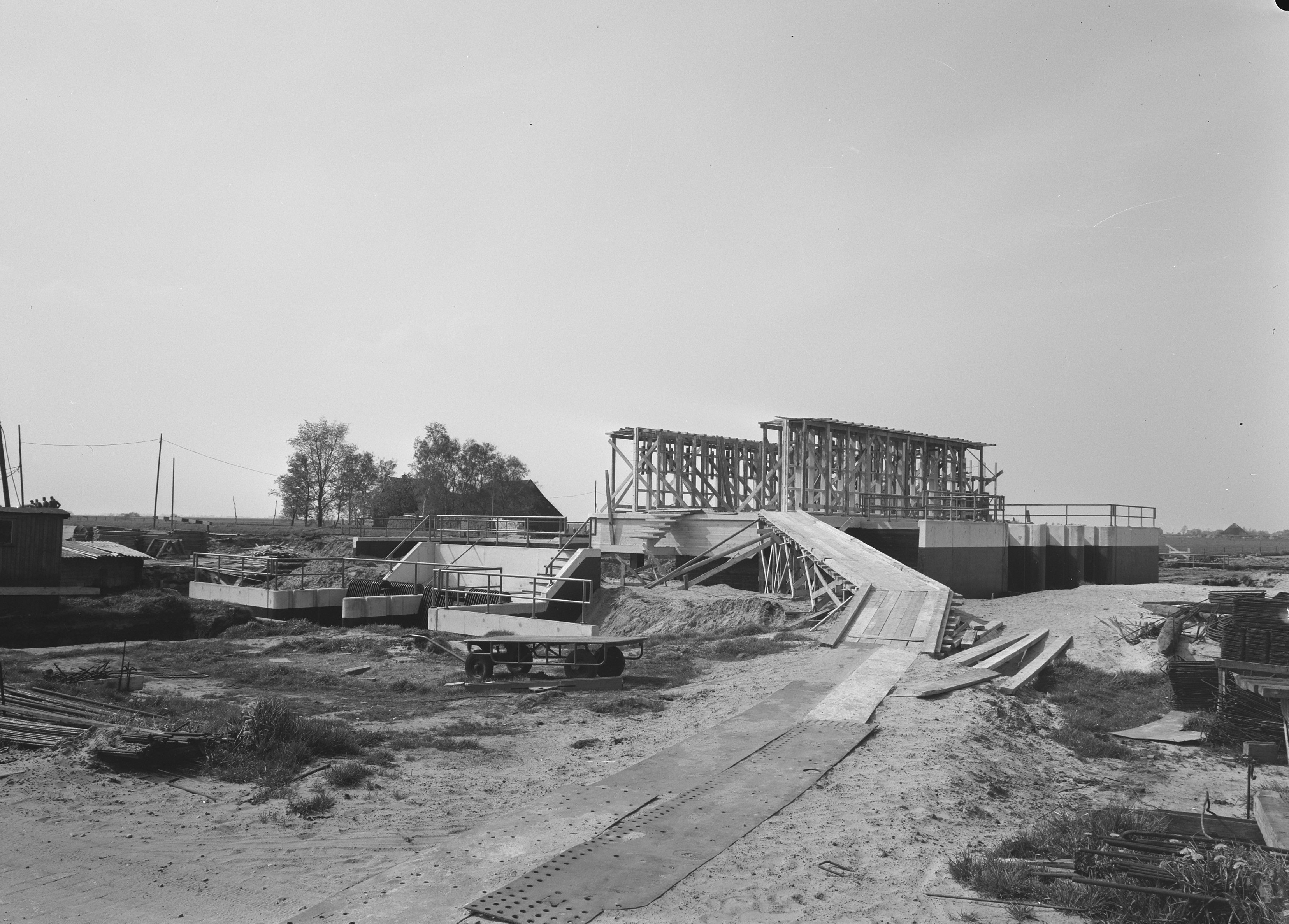 Collectie / Archief : Fotocollectie Nederlandse Heidemaatschappij Reportage / Serie : [ onbekend ] Beschrijving : inpoldering en bemaling, gemalen, werkzaamheden, ruilverkavelingen, haskerveenpolder Datum : mei 1960 Trefwoorden : gemalen, inpoldering en bemaling, ruilverkavelingen, werkzaamheden Persoonsnaam : haskerveenpolder Fotograaf : [onbekend] Auteursrechthebbende : Nationaal Archief Materiaalsoort : Negatief (zwart/wit) Nummer archiefinventaris : bekijk toegang 2.24.06.02 Bestanddeelnummer : 159-1018